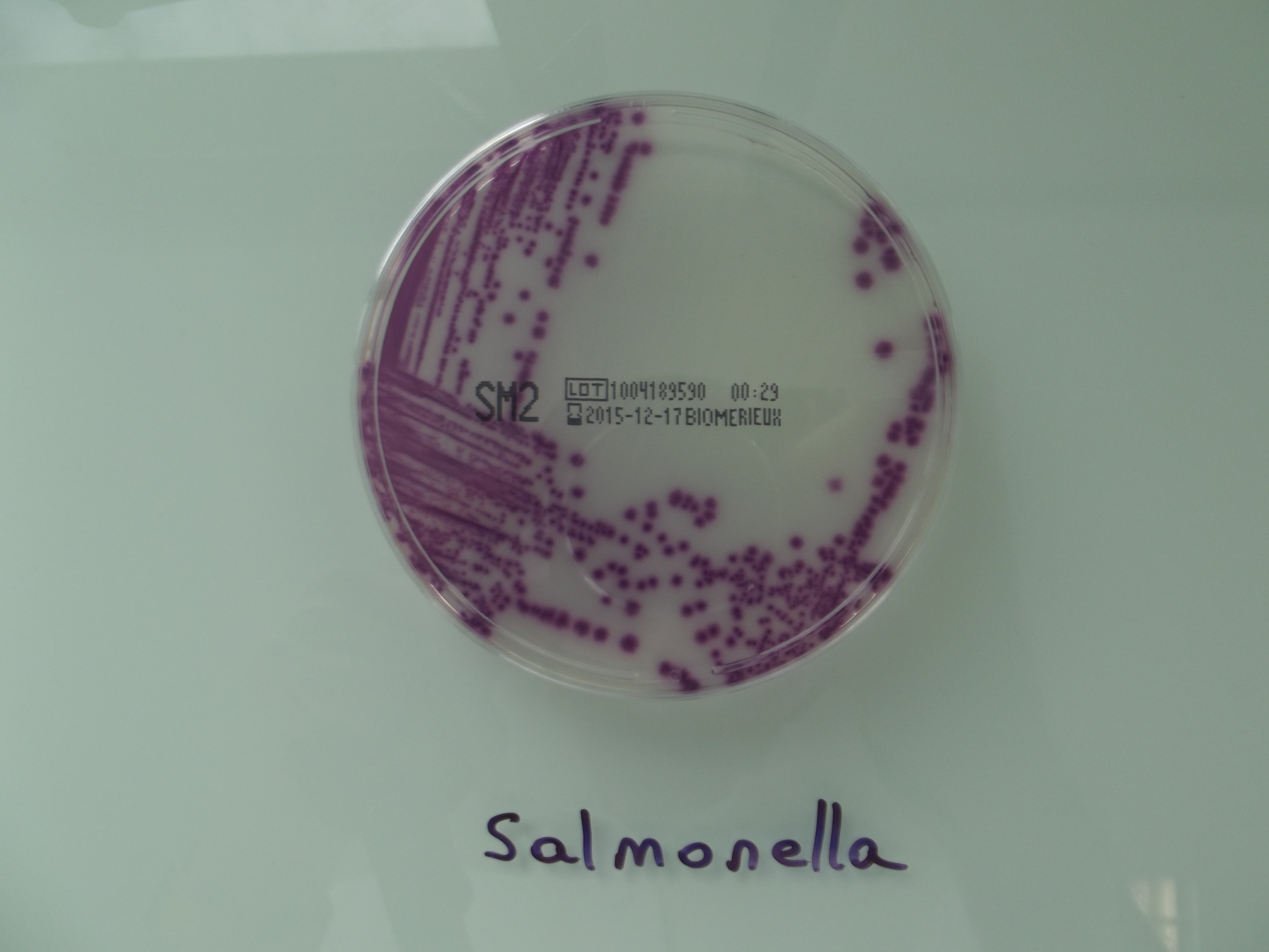 Salmonella coproculture sur SM2